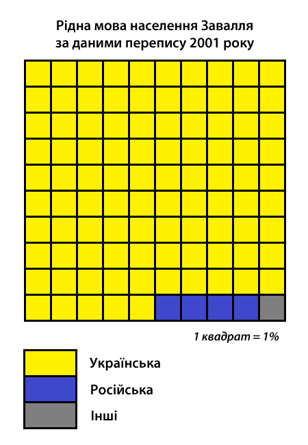 Інфографіка розподілу населення смт Завалля Гайворонського району за рідною мовою згідно з даними перепису 2001 року. Джерело: Розподіл населення Кіровоградської області за рідною мовою (у % до загальної чисельності населення) за переписом 2001 року